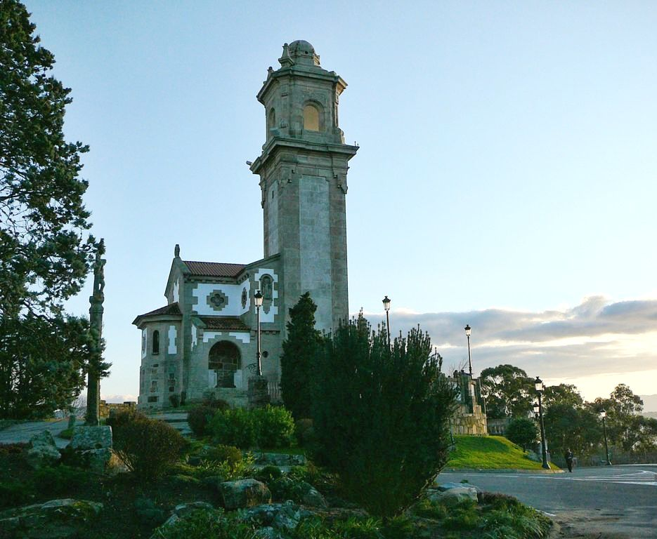 Vigo. Ermida da Guía